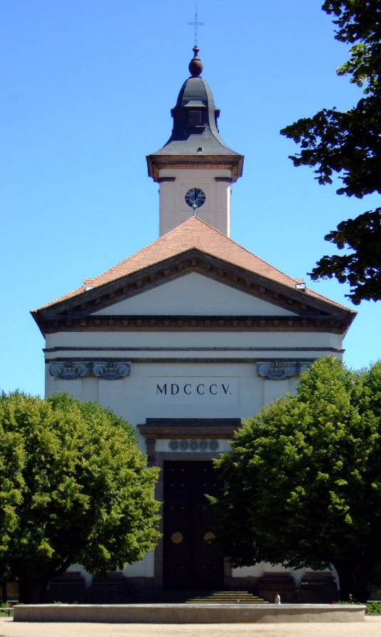 Kirche in Theresienstadt Aufnahme: 1. Juli 2006 Url